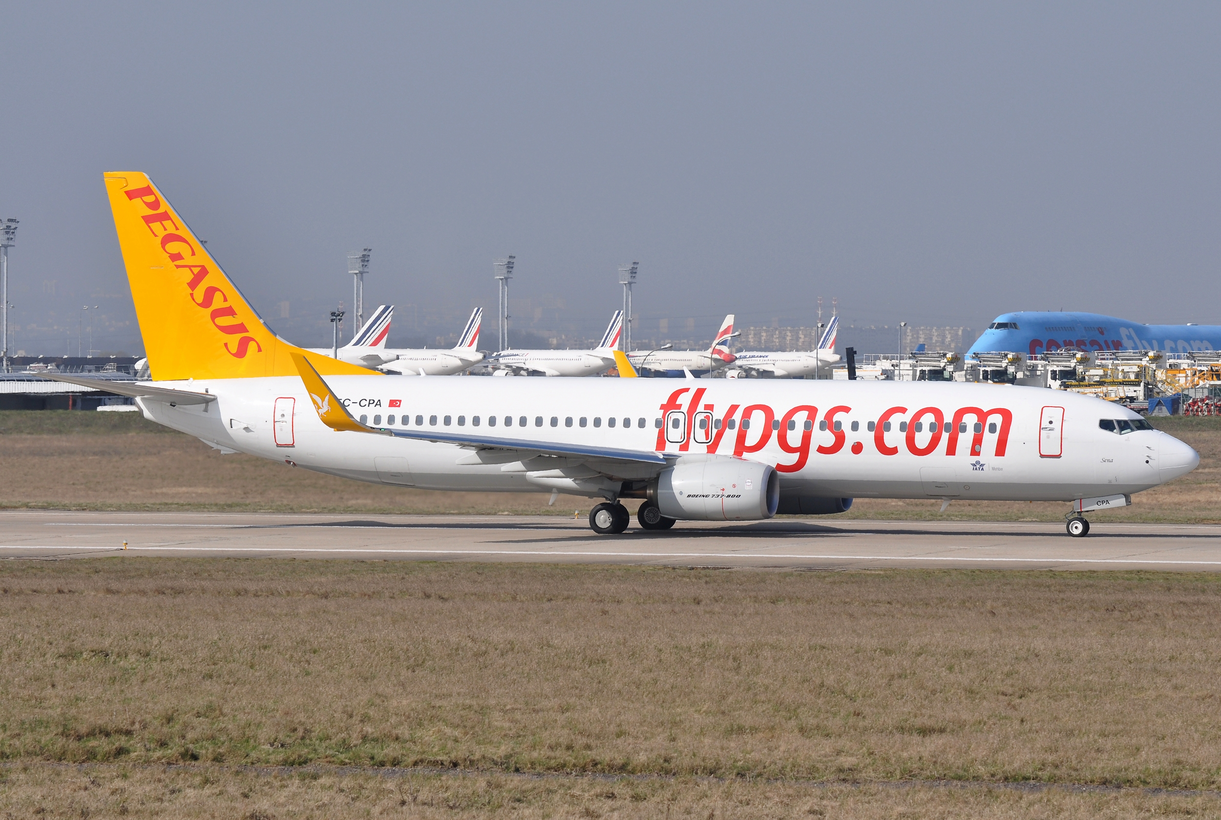 MSN 40725 B737-82R PEGASUS AIRLINES ORY NEW BABY, ONLY TWO MONTH OLD !